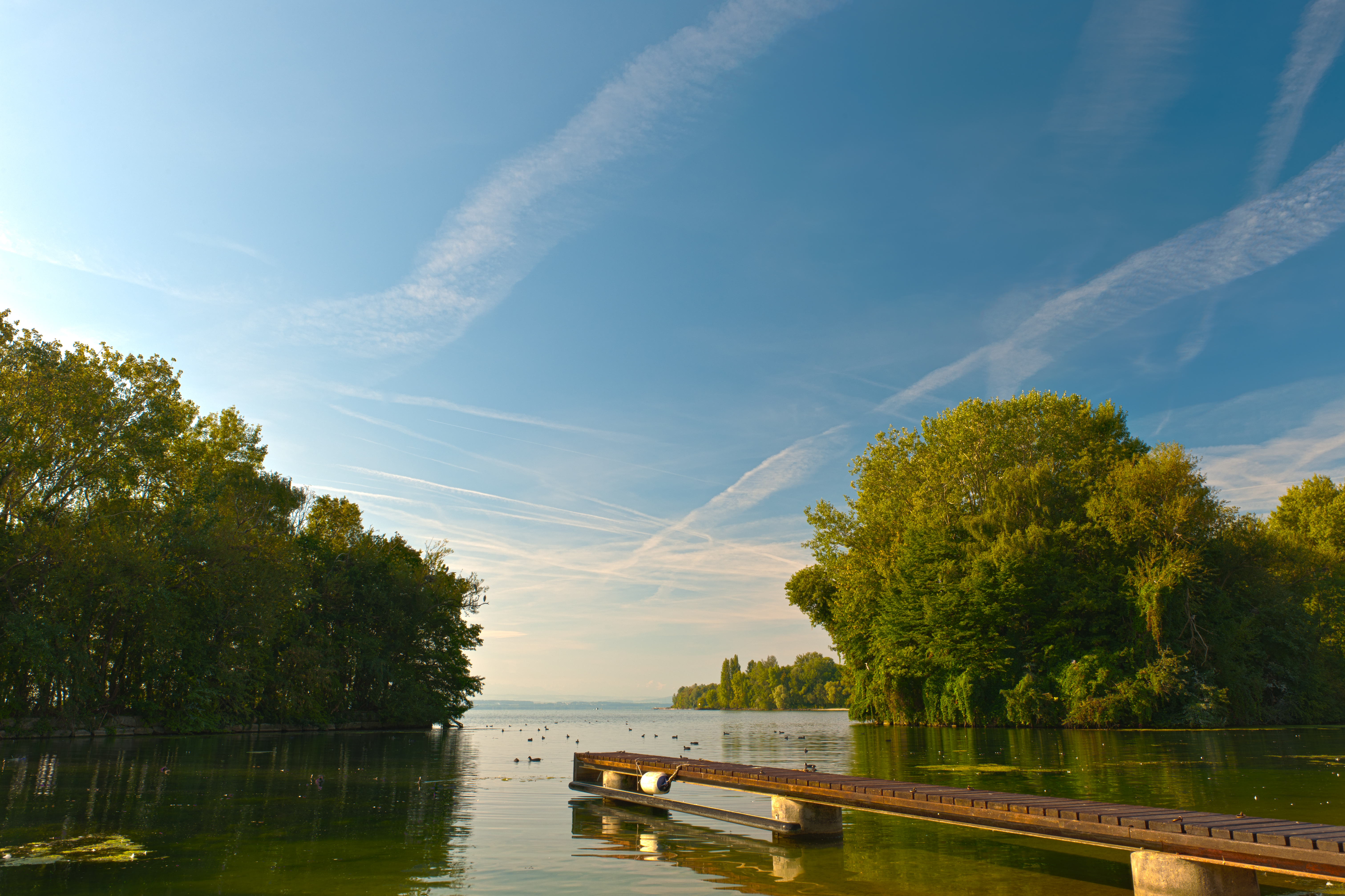 Auvernier, Baie d'Auvernier (stations lacustres préhistoriques)